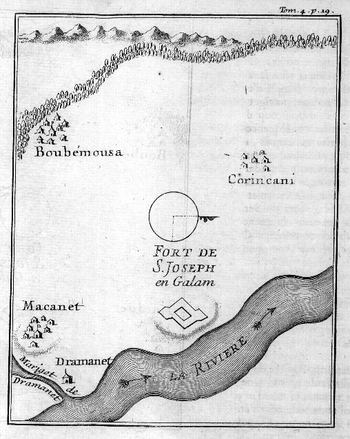 Emplacement du Fort de Saint-Joseph en Galam (Sénégal), illustration de Nouvelle relation de l’Afrique occidentale, de Jean-Baptiste Labat